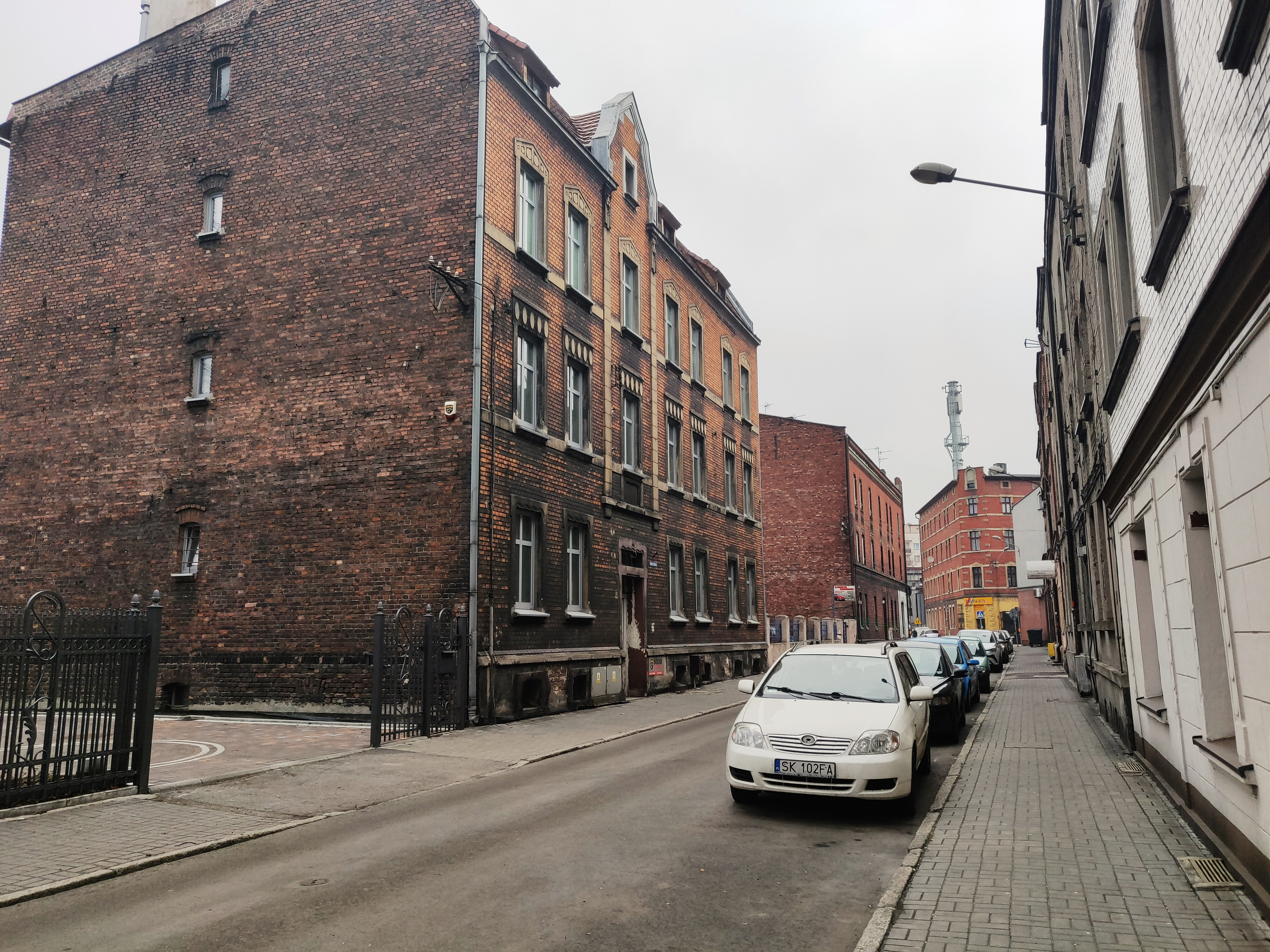 Ulica Stacyjna w Katowicach